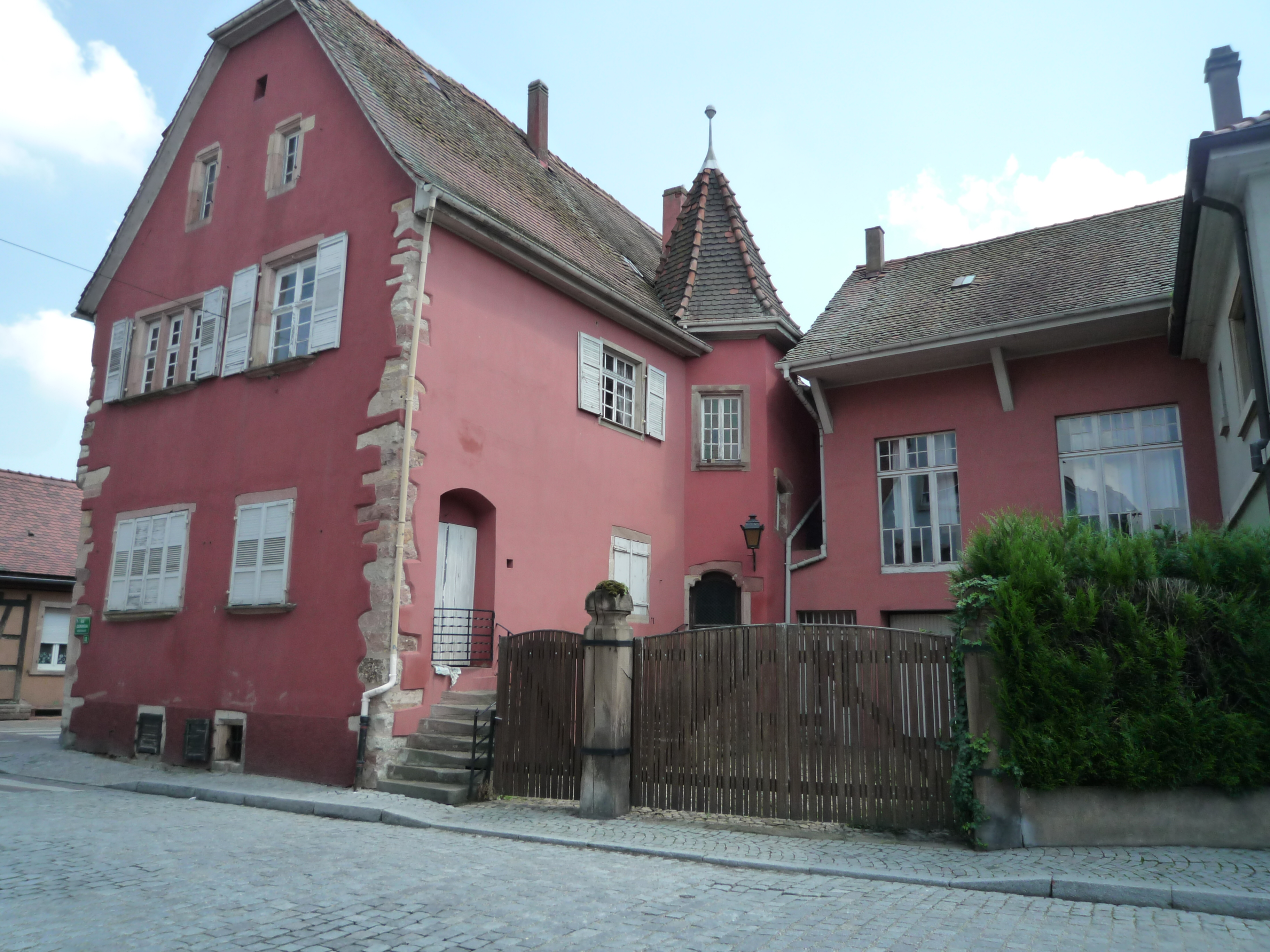 Façade côté rue Clemenceau .